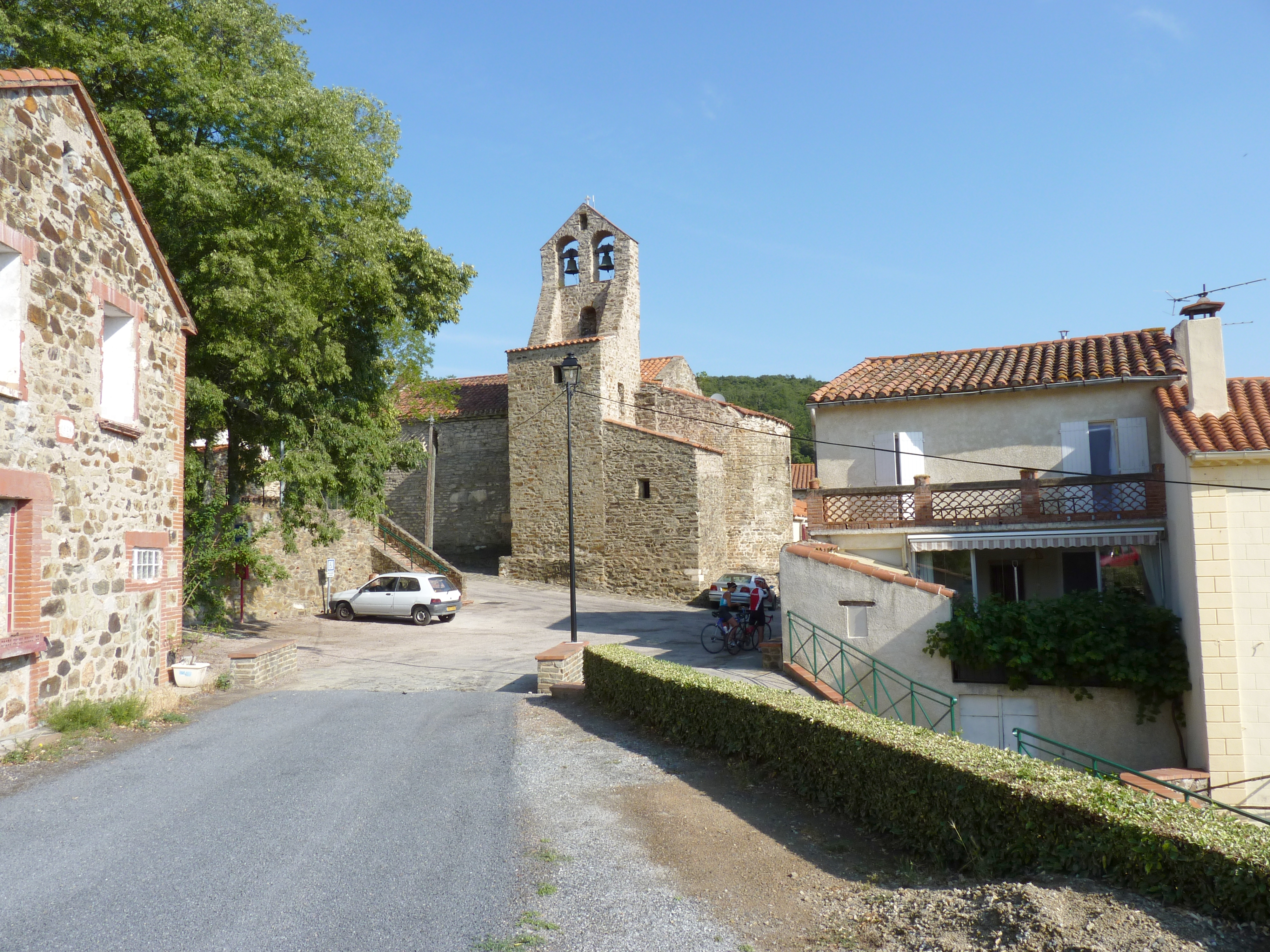 Église et village, Taillet (Pyrénées-Orientales, Languedoc-Roussillon, France)